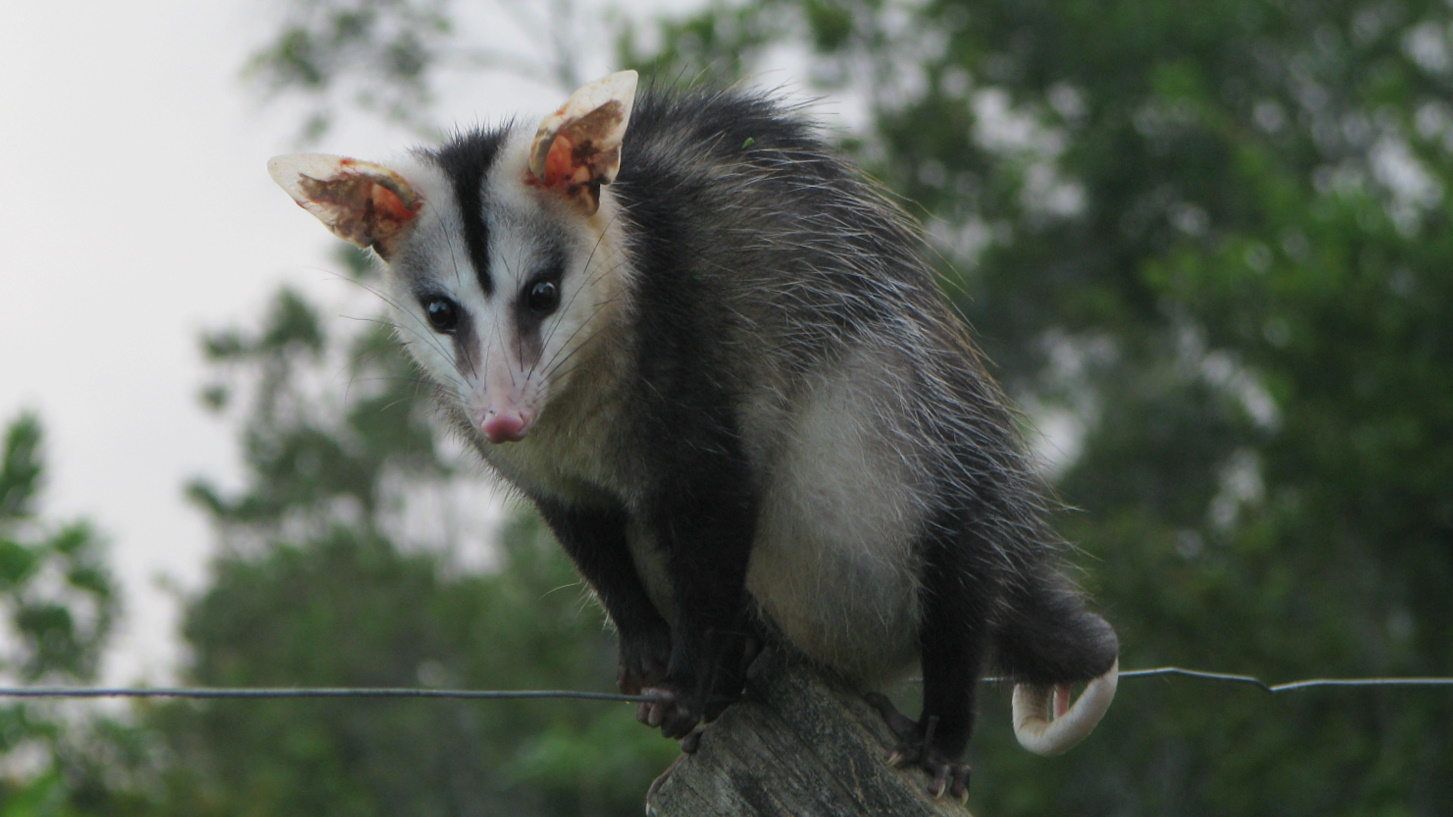 Didelphis albiventris (Lund, 1840)